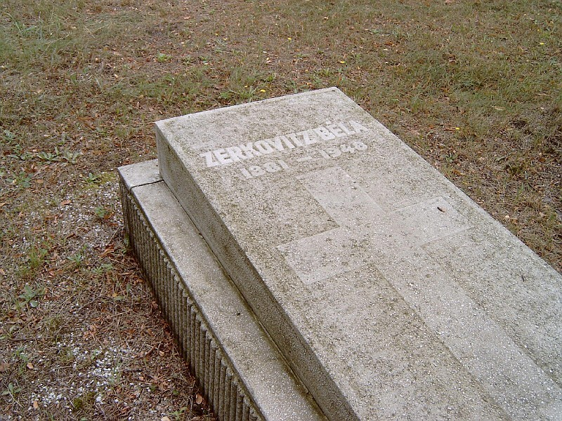 Zerkovitz Béla sírja Budapesten. Kerepesi temető: 24/1-1-68.